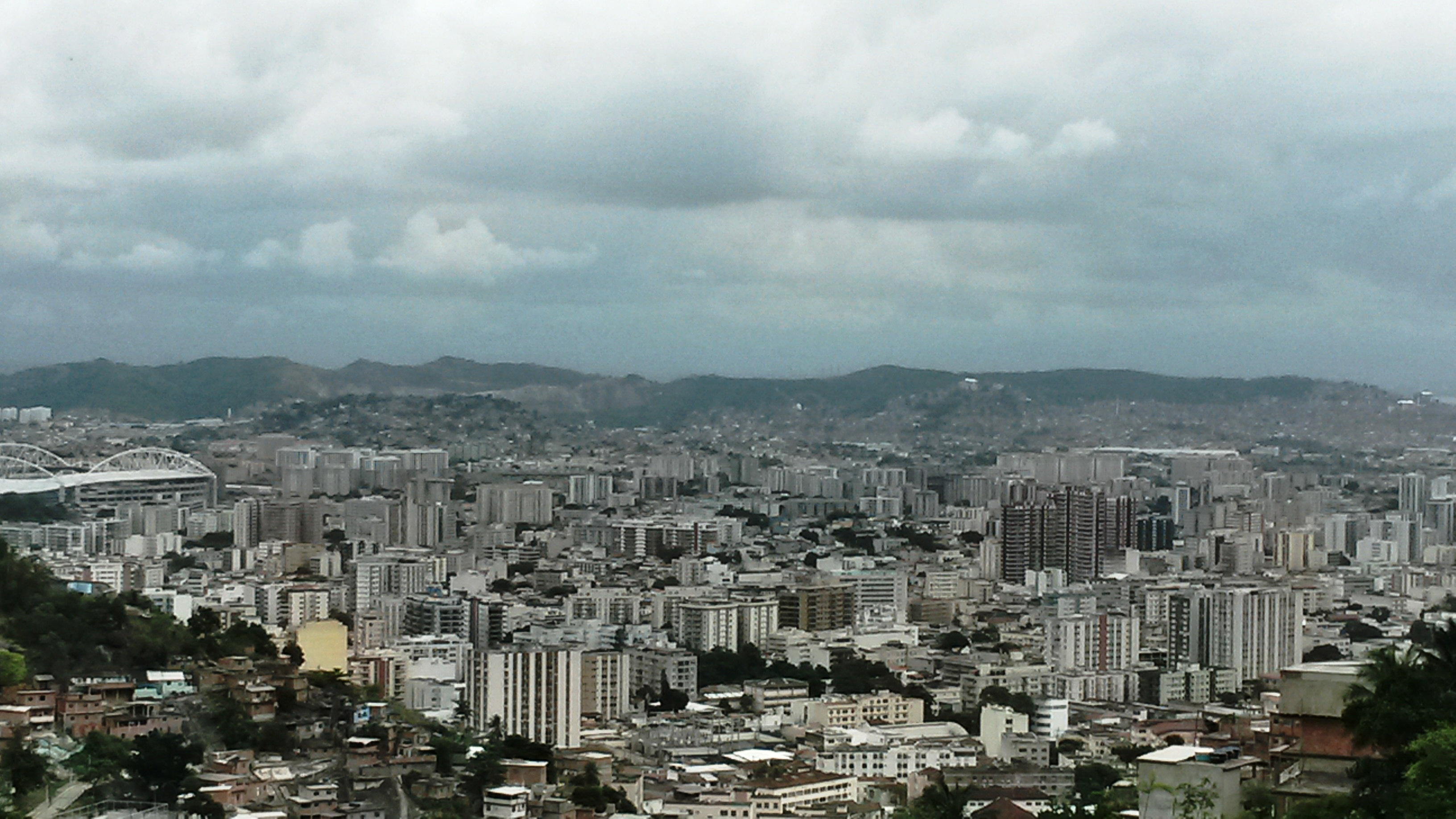 Foto panorâmica da zona norte do Rio de Janeiro, batida da Auto-Estrada Grajaú Jacarepaguá